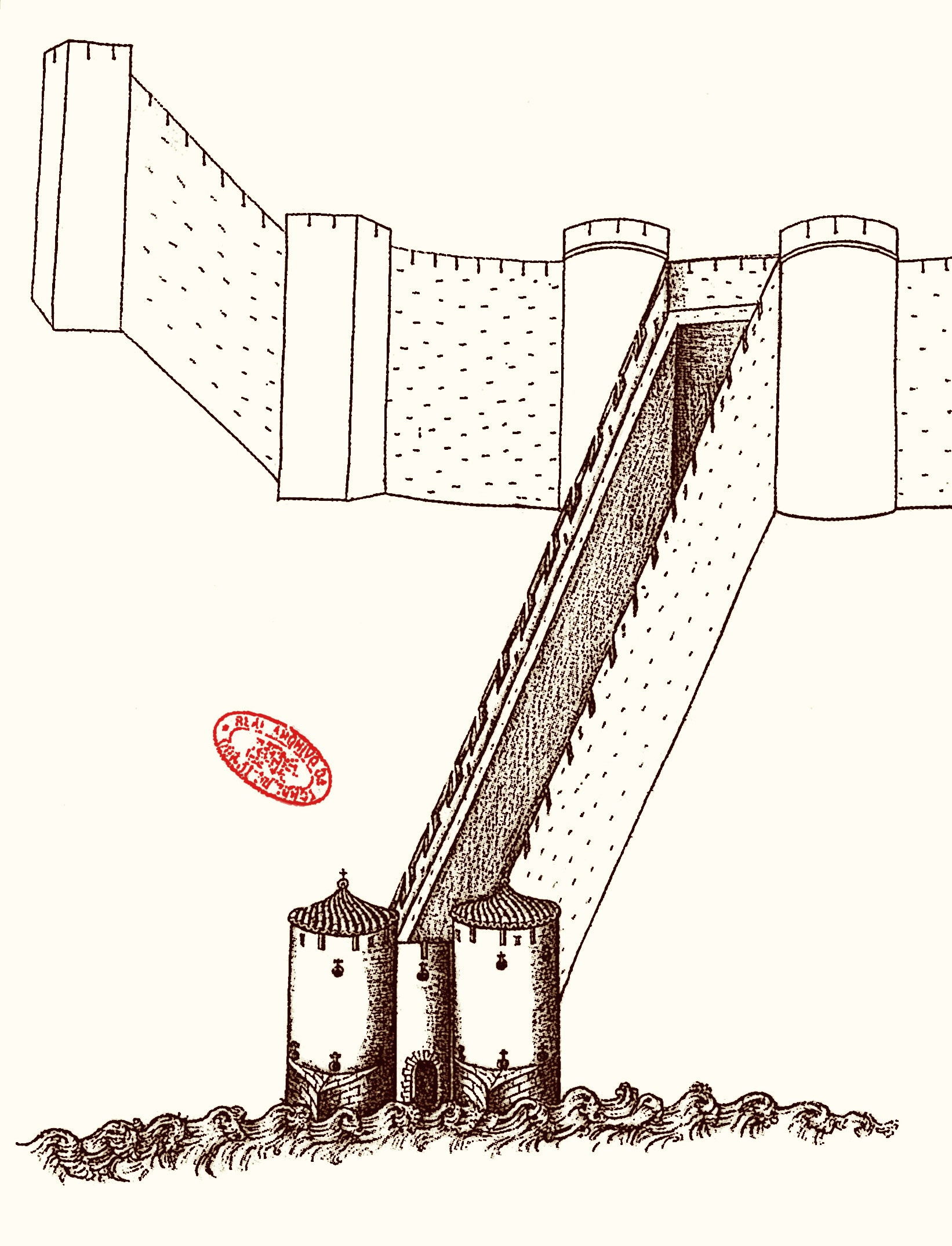 Desenho a pena sobre papel (Torre do Tombo, Lisboa. gaveta XV, 48-26), representando o projecto de couraça para Alcácer-Ceguer, de Diogo Boitaca